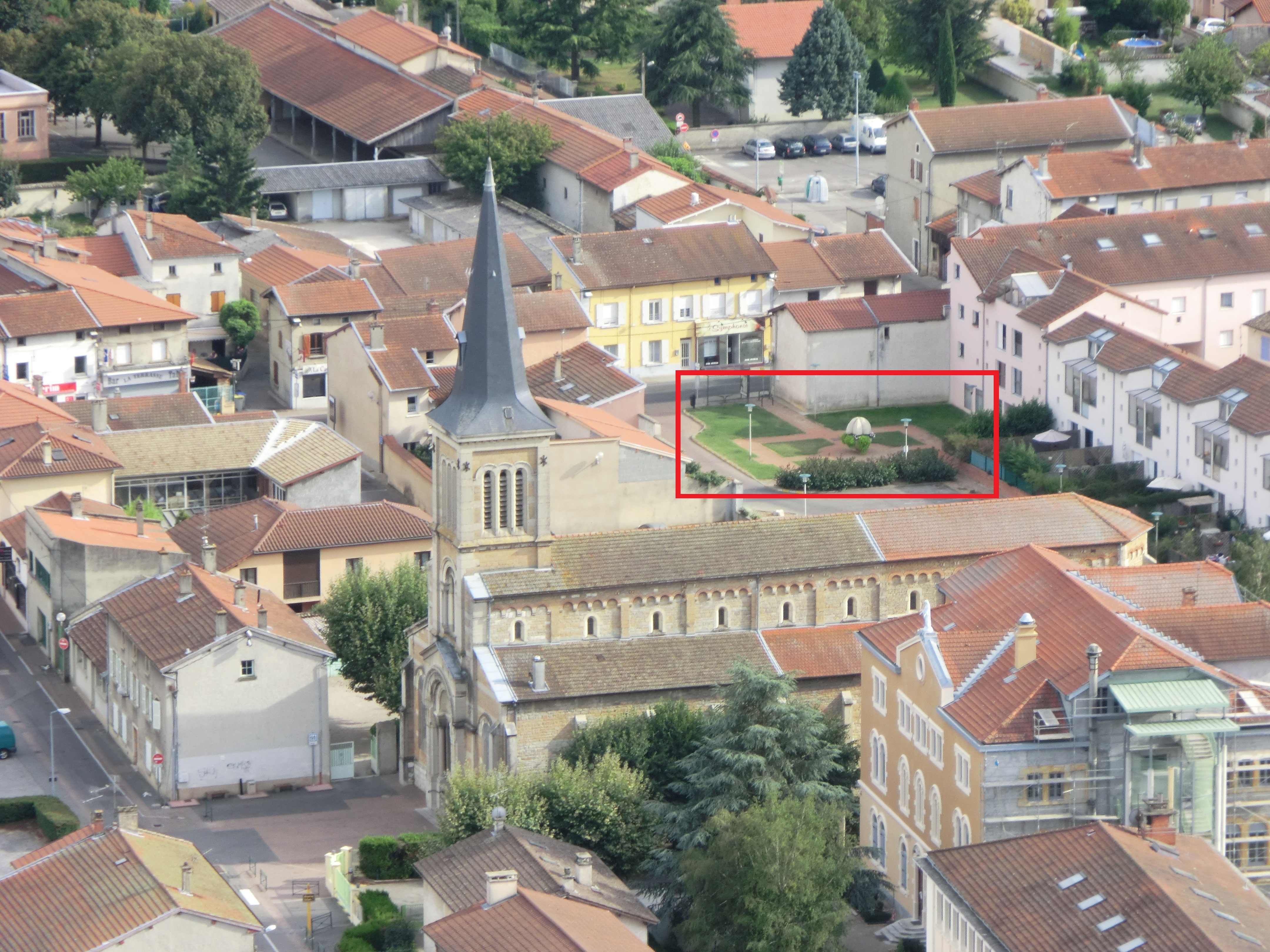 Mise en évidence sur Lucien-Agnel, près de l'église Saint-Romain de Miribel depuis le sommet de la Vierge du Mas Rillier.